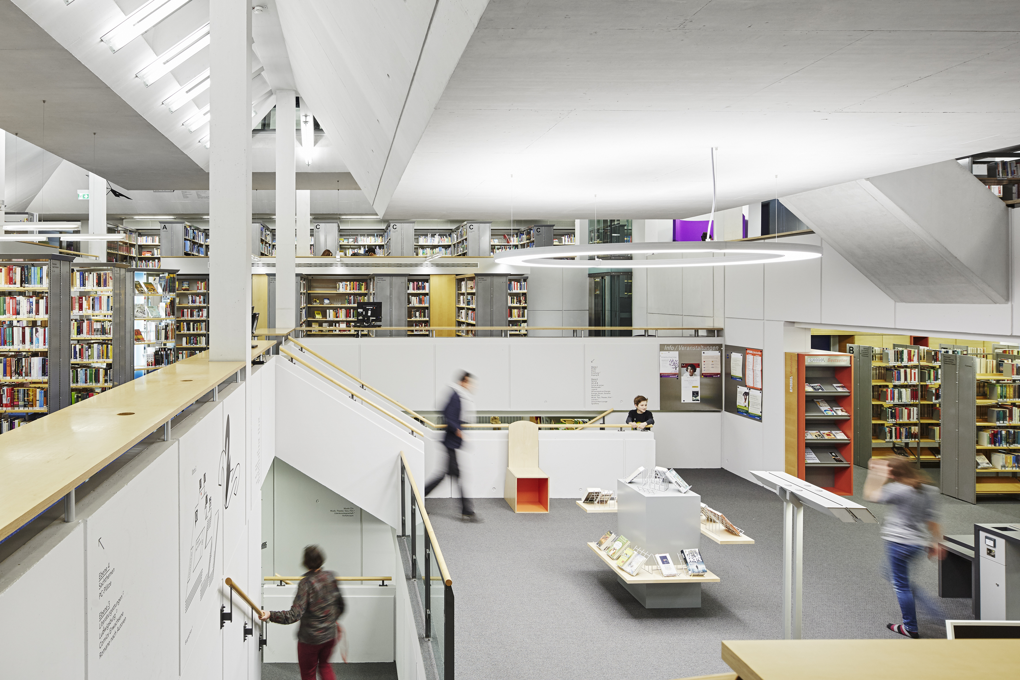 Der Bereich Sachthemen und Romane.